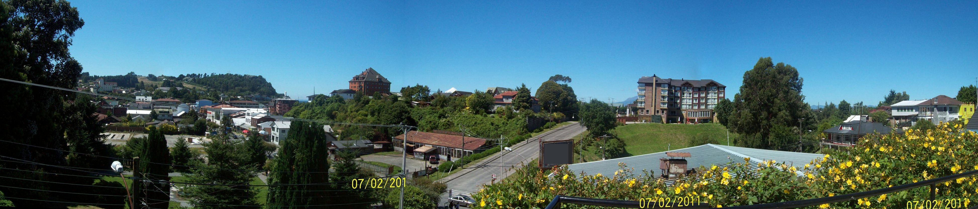 Panorama de parte del centro de Puerto Varas desde iglesia sagrado corazón de jesús.